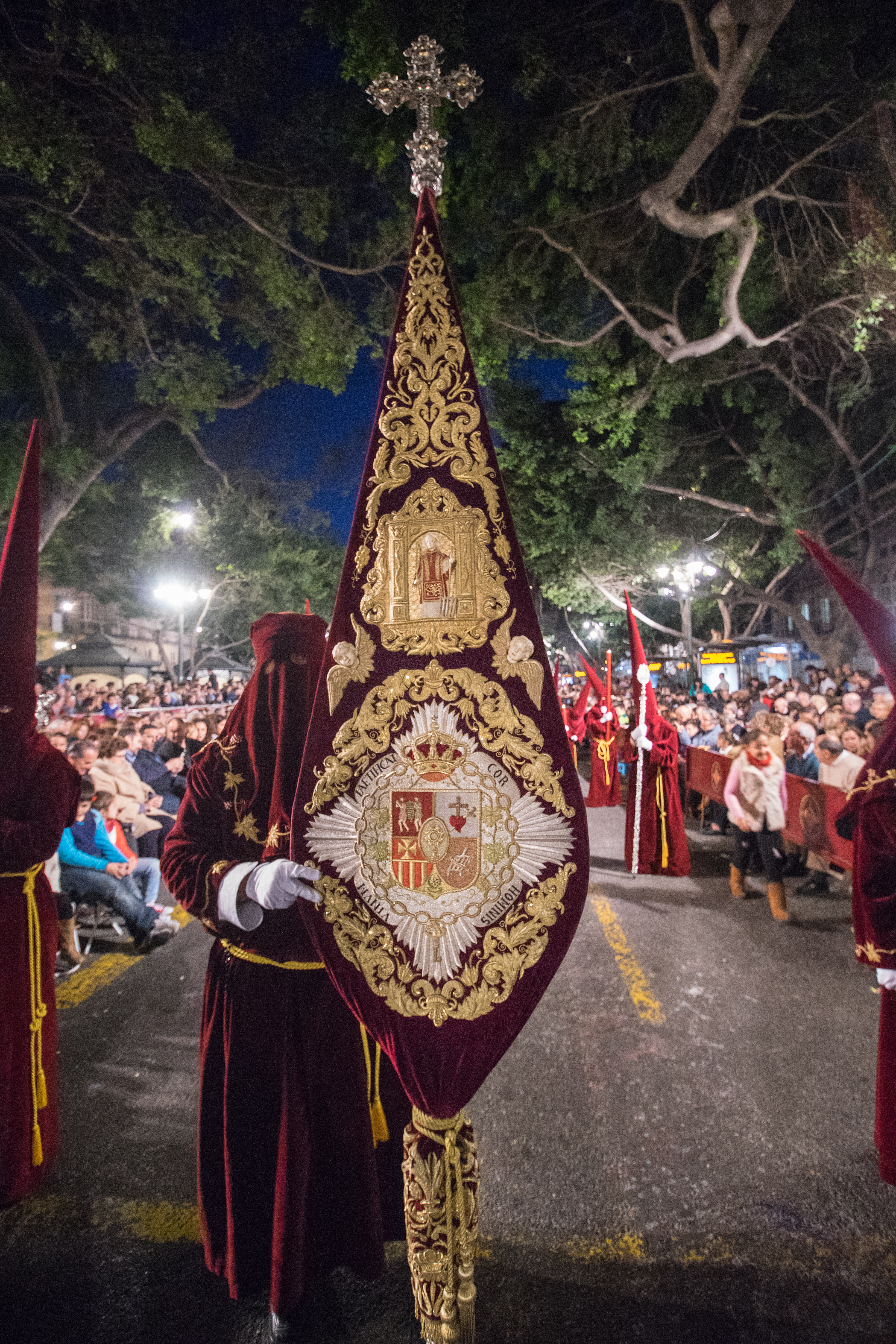 Guion de la Muy Ilustre, Antigua y Venerable Hermandad Sacramental de Nuestro Padre Jesús Nazareno de Viñeros, Nuestra Señora del Traspaso y Soledad de Viñeros y San Lorenzo Mártir This is a photography of a Folklore festival in Spain (Wikidata id Q9075883).